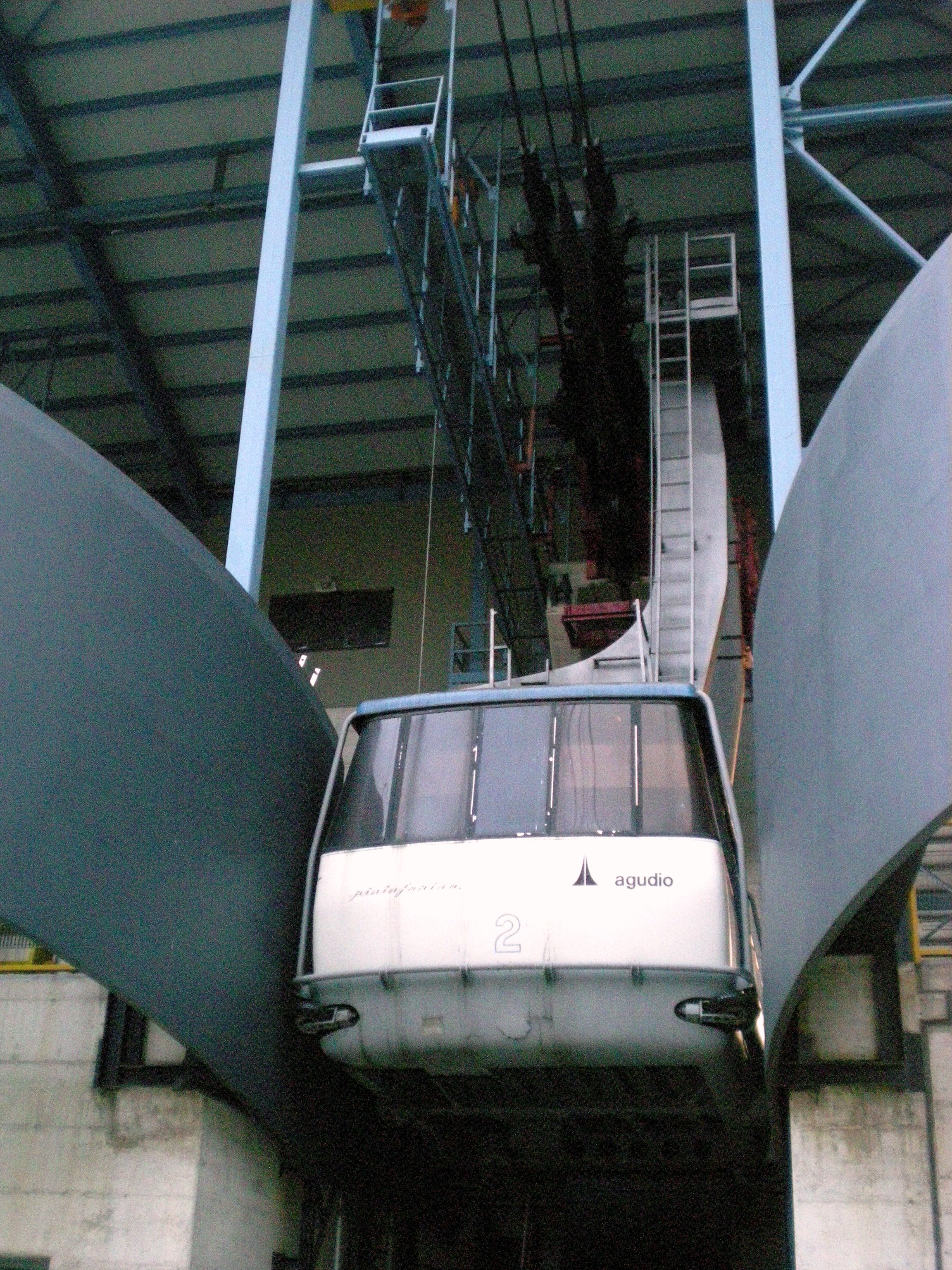 Particolare della cabina disegnata da Pininfarina per la funivia Agudio del Gran Sasso d'Italia (L'Aquila)